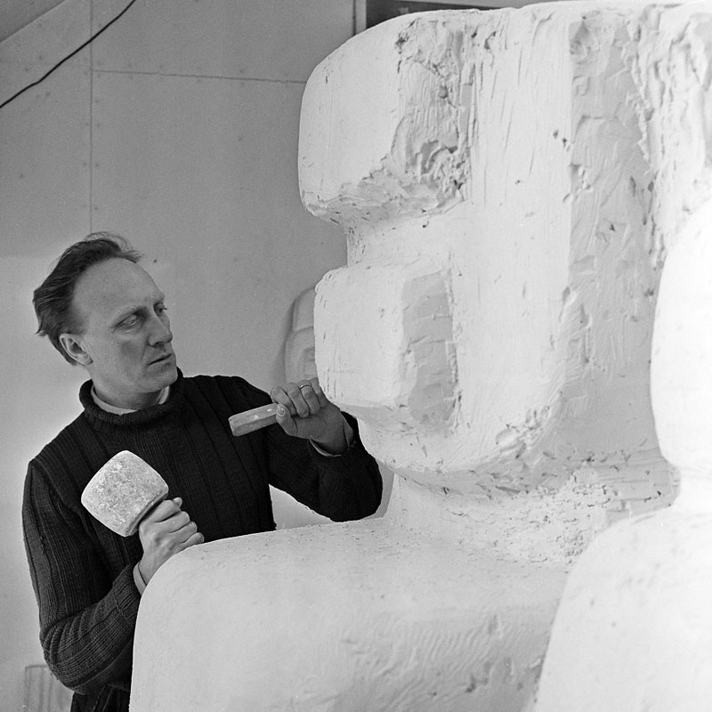 Skulptör Ture Johansson, Fjällgatan. Inför utställningen "Söder i konsten"